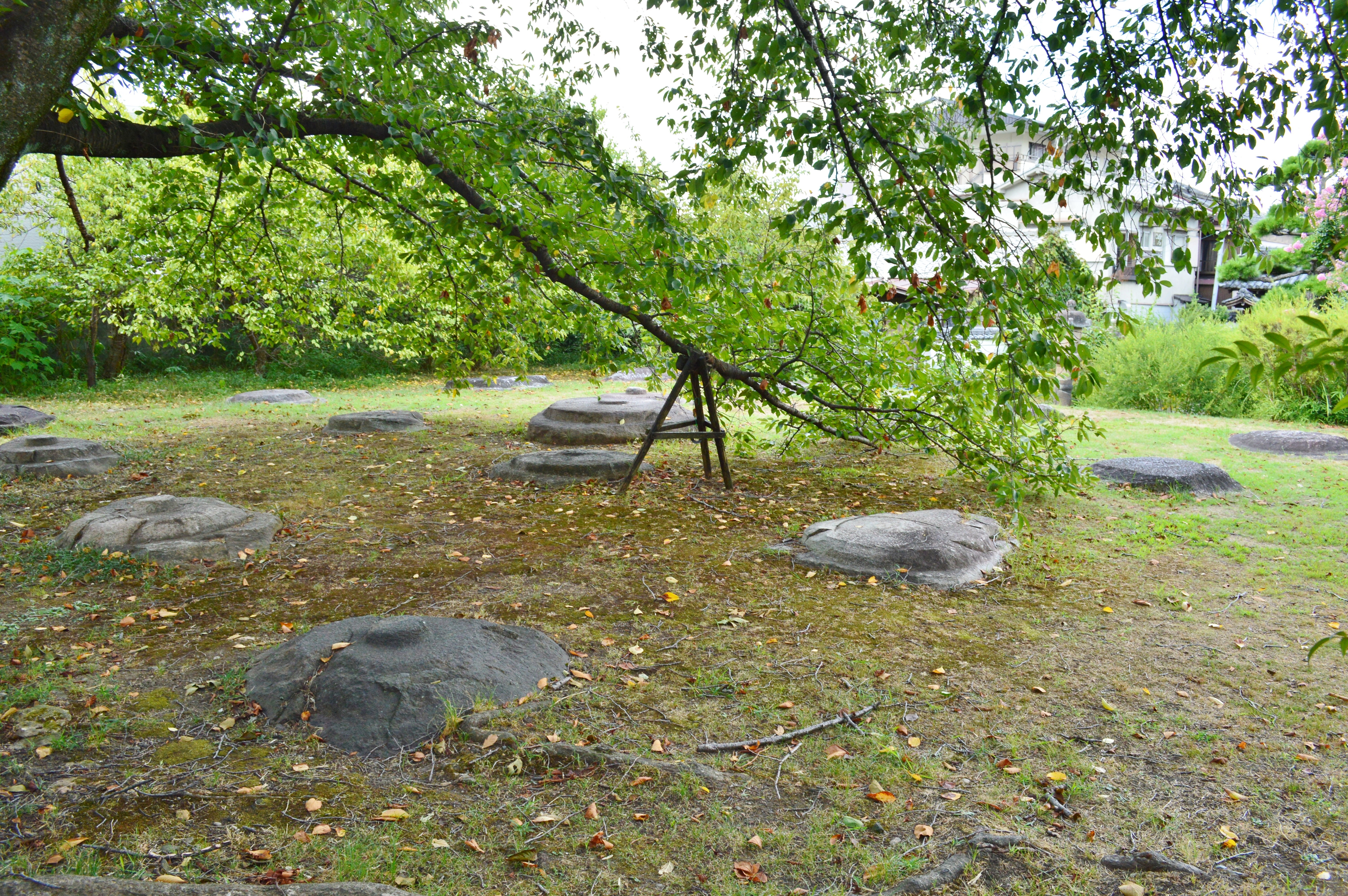 旧元興寺 塔跡